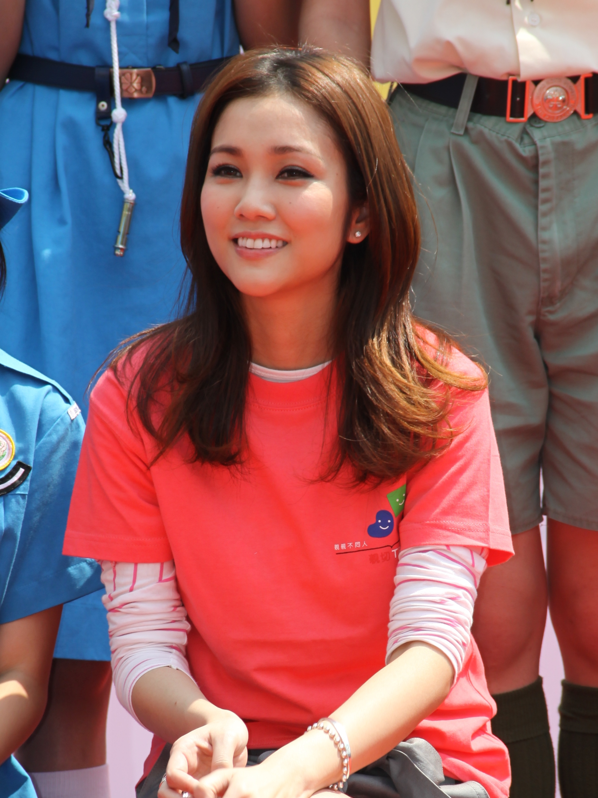 中文（香港）: 謝安琪出席"親切共融之旅2011"活動